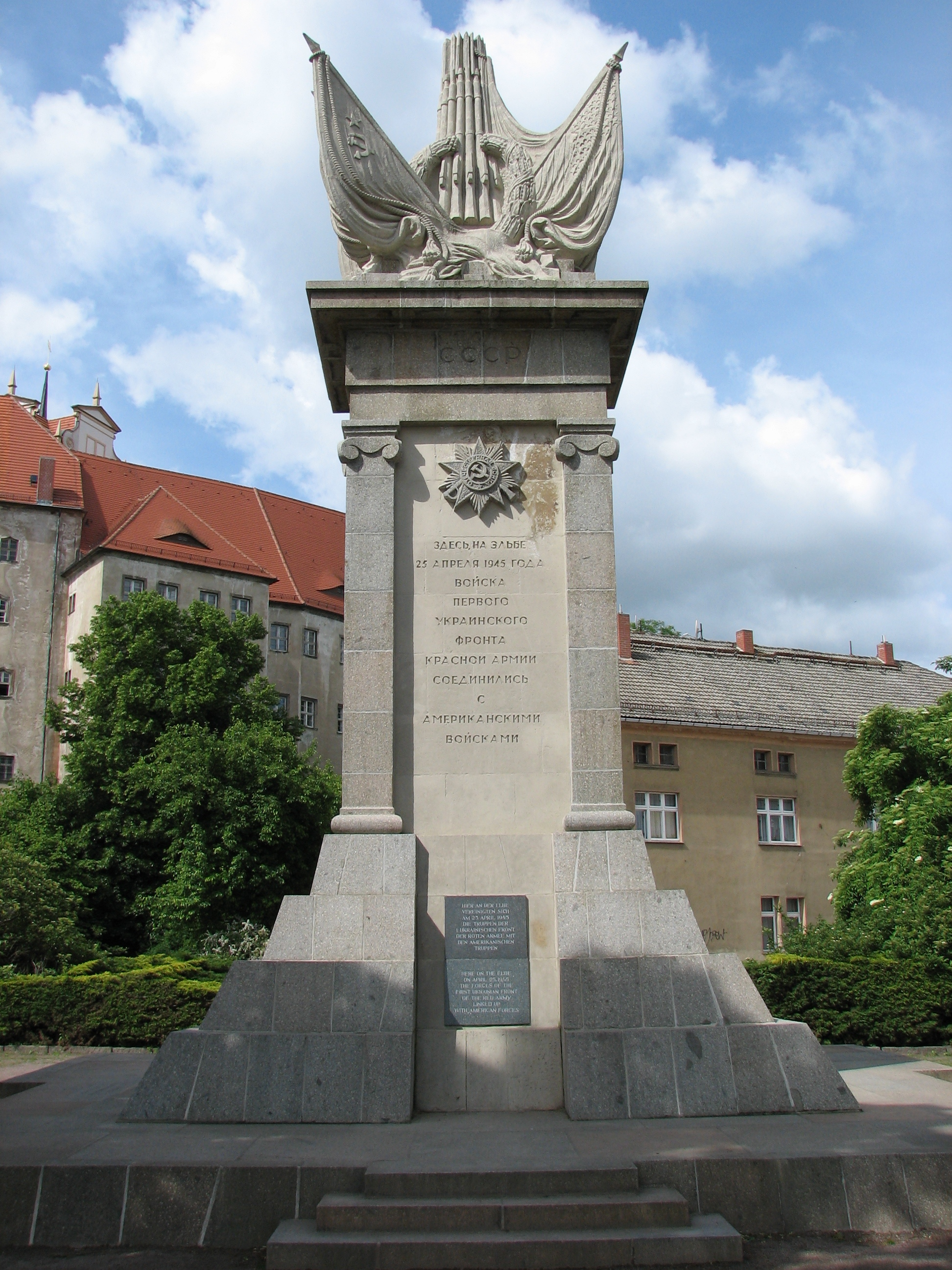 Denkmal anlässliches des Zusammenschlusses der Alliierten Truppen bei Torgau